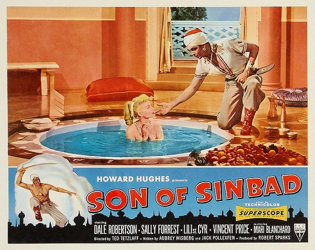 Poster del film Son of Sinbad